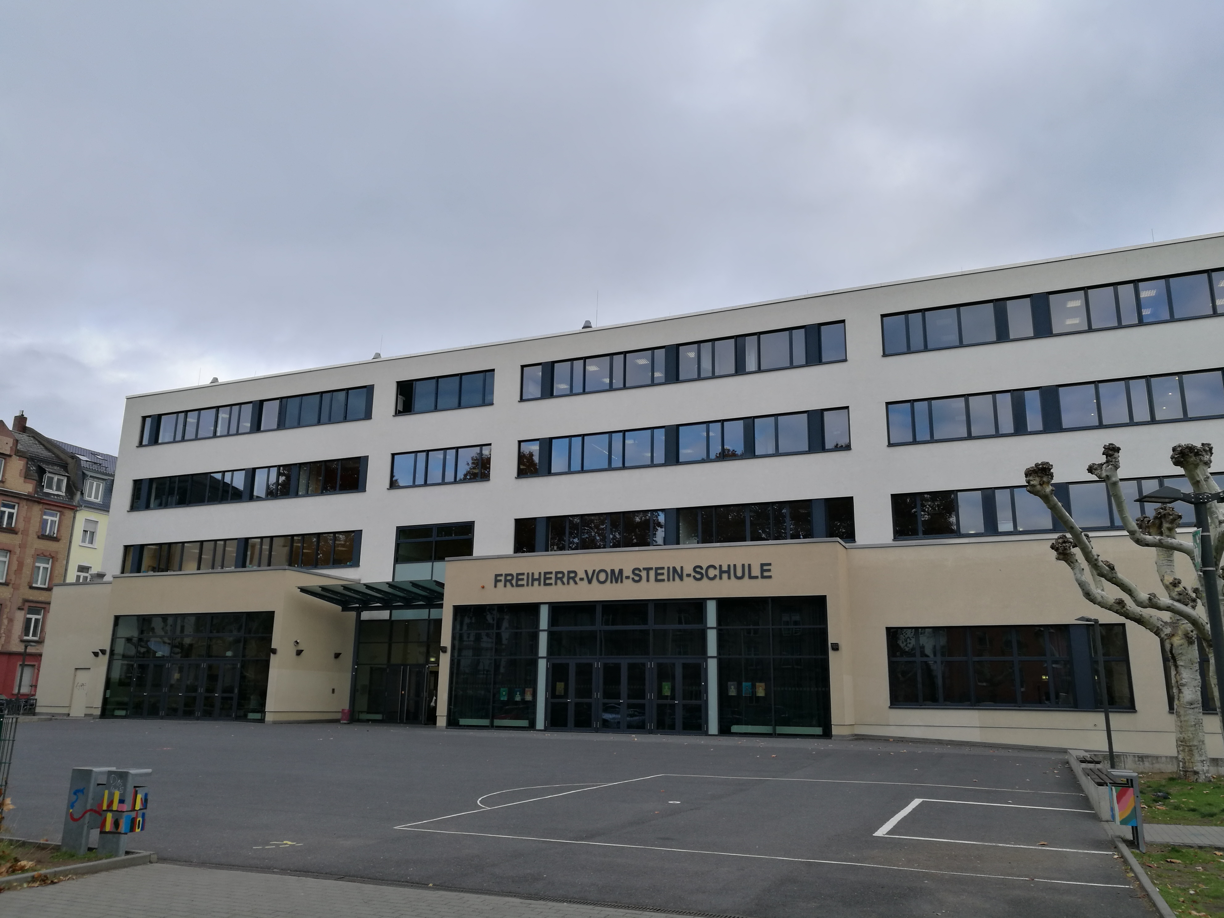 Haupteingang der Freiherr-vom-Stein-Schule